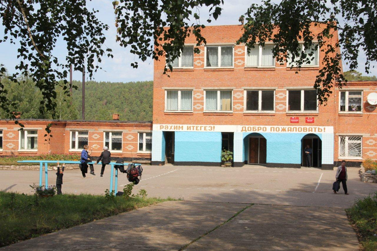 Шереметьевская школа